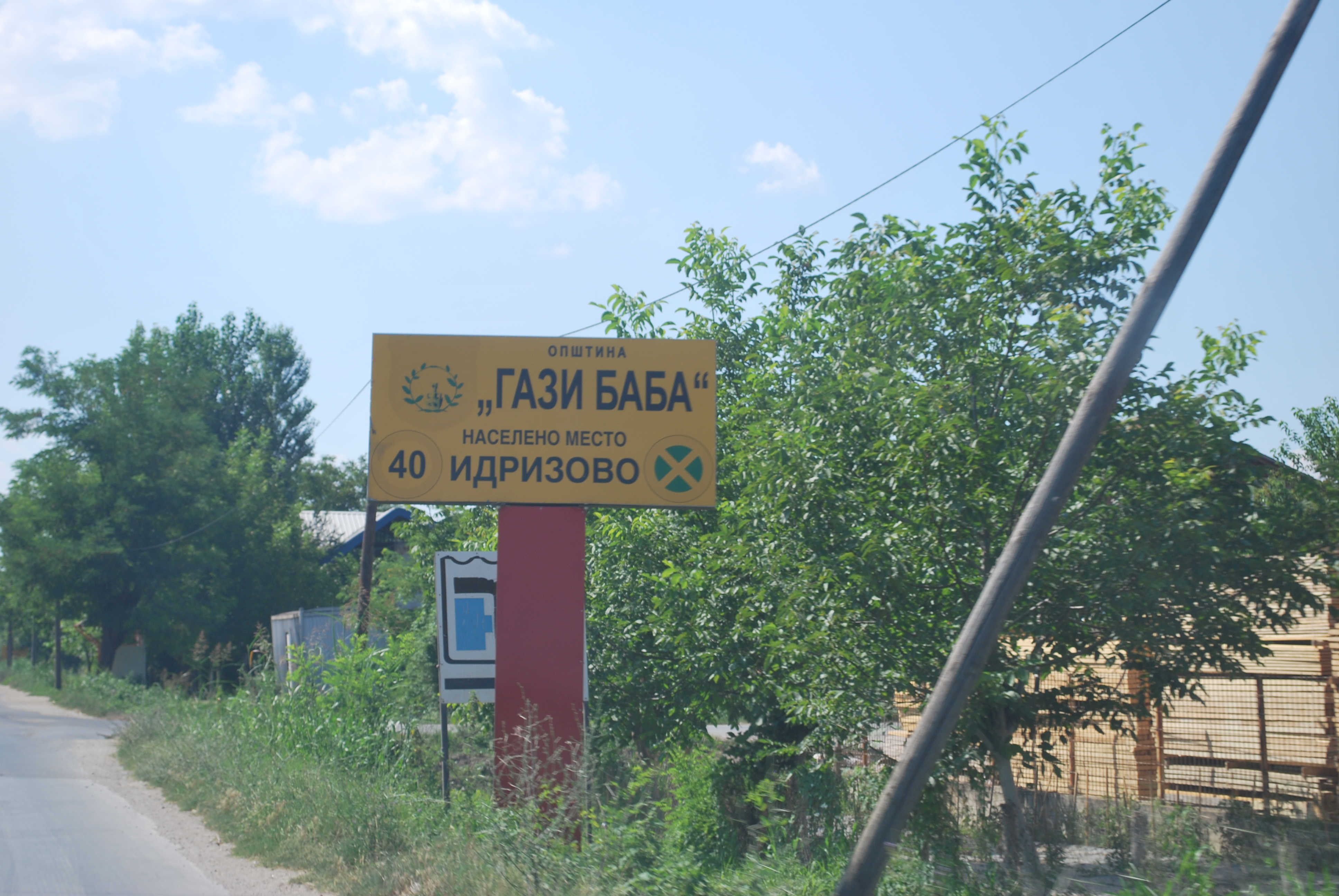 Idrizovo